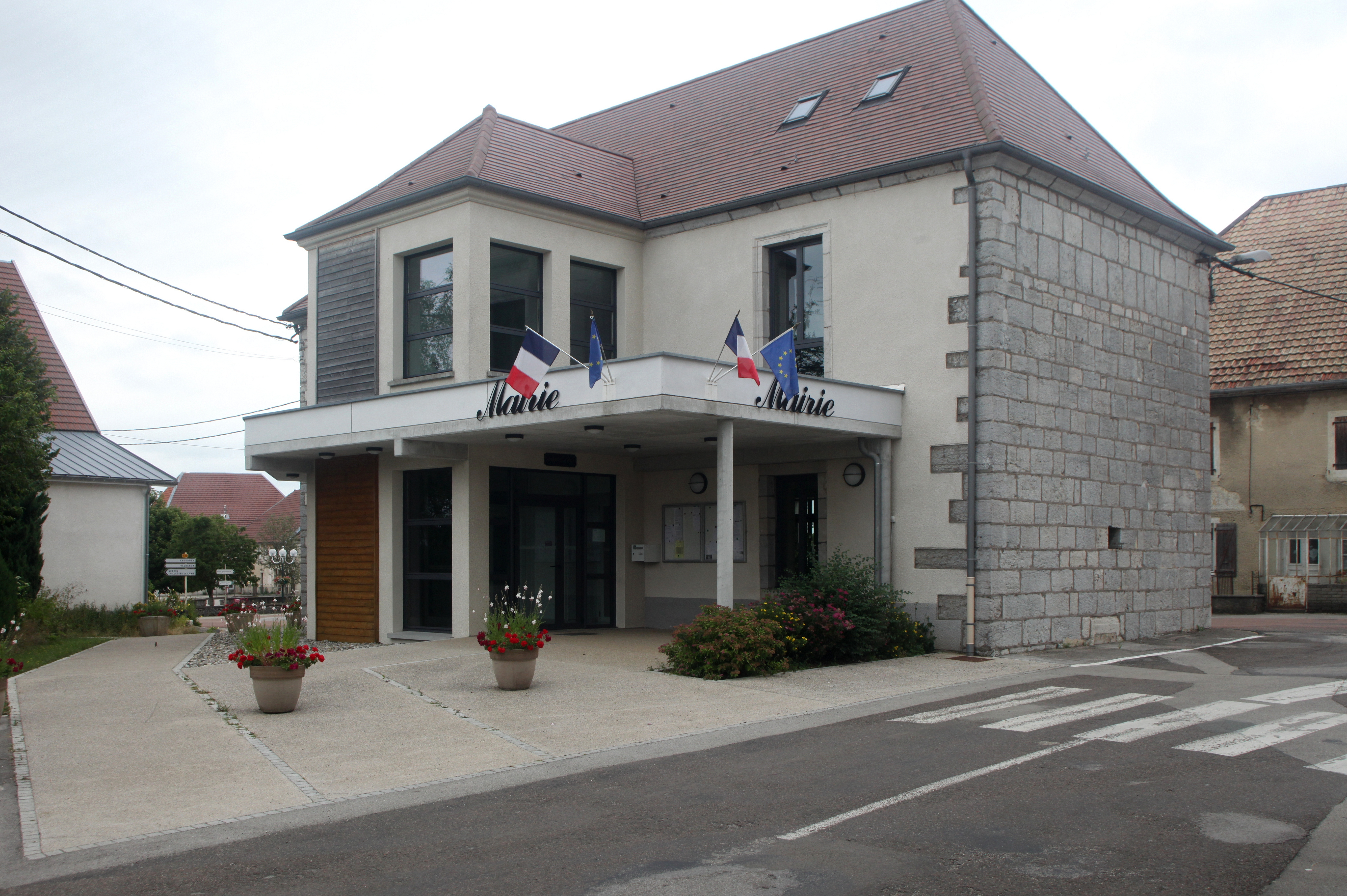 Mairie d'Épenoy (Doubs).